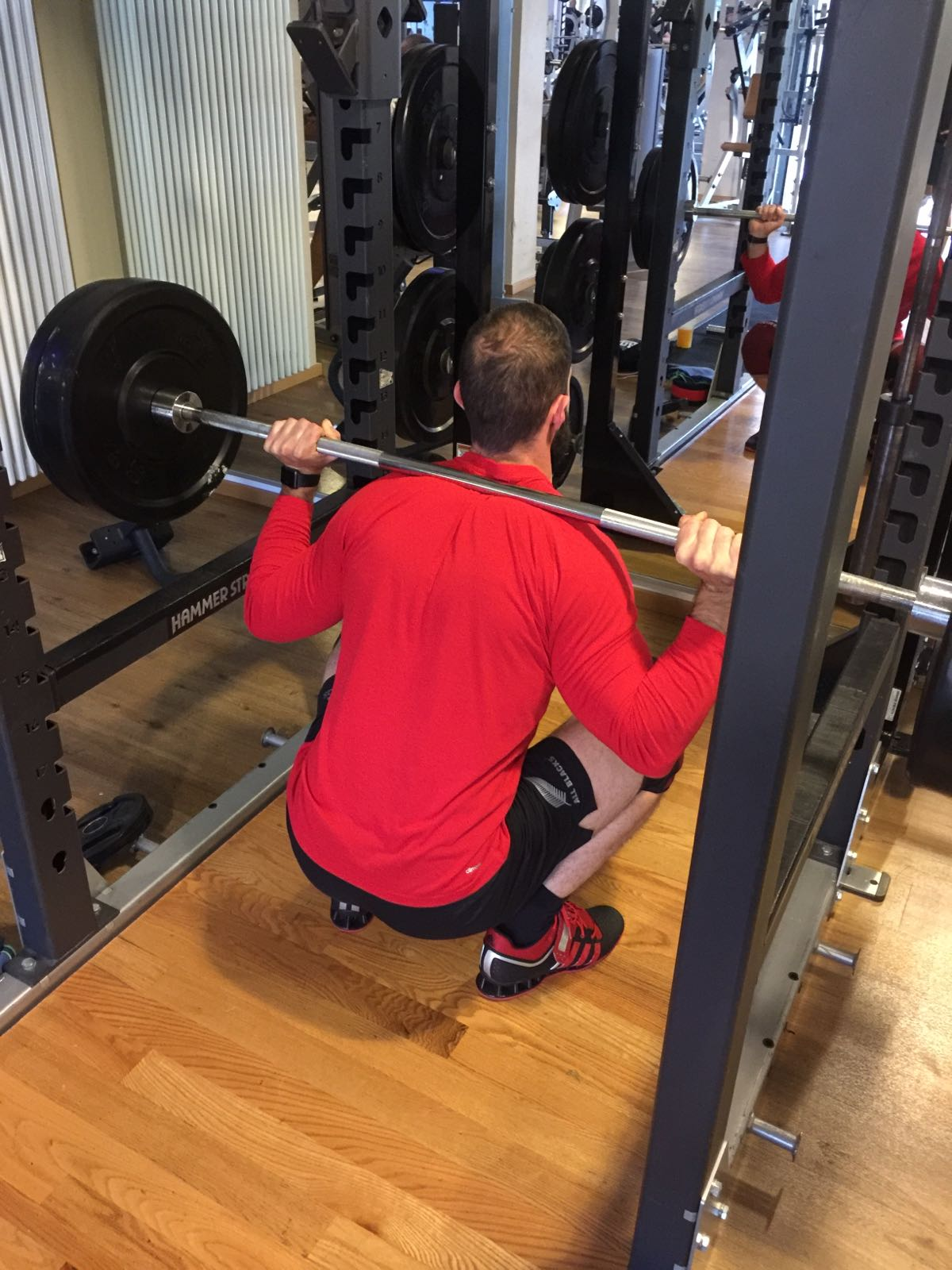 Powerbuilder bei einer Trainingseinheit